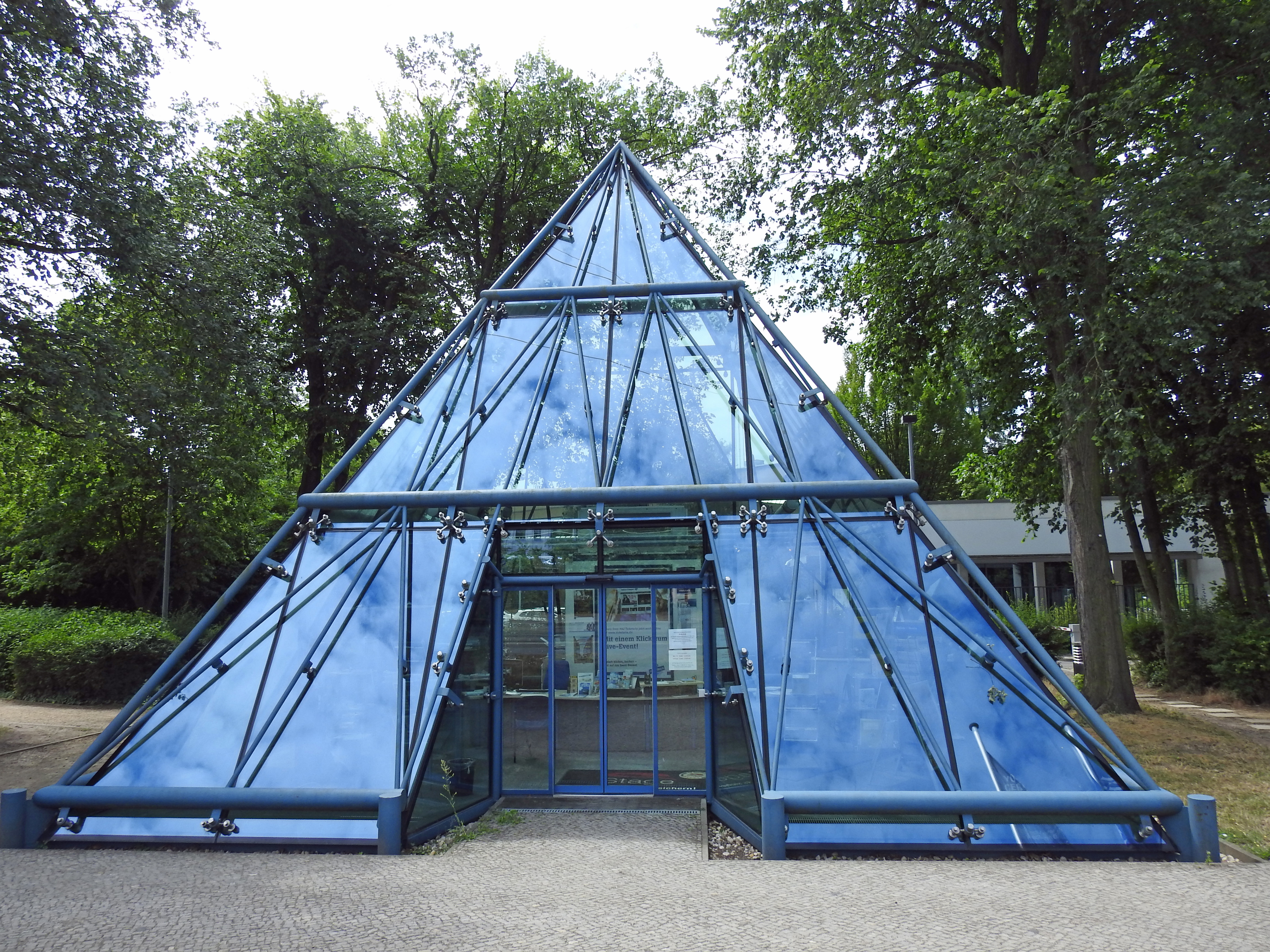 Pavillon der Märkischen Allgemeinen in Pyramidenform an der Friedrich-Engels-Straße in Potsdam